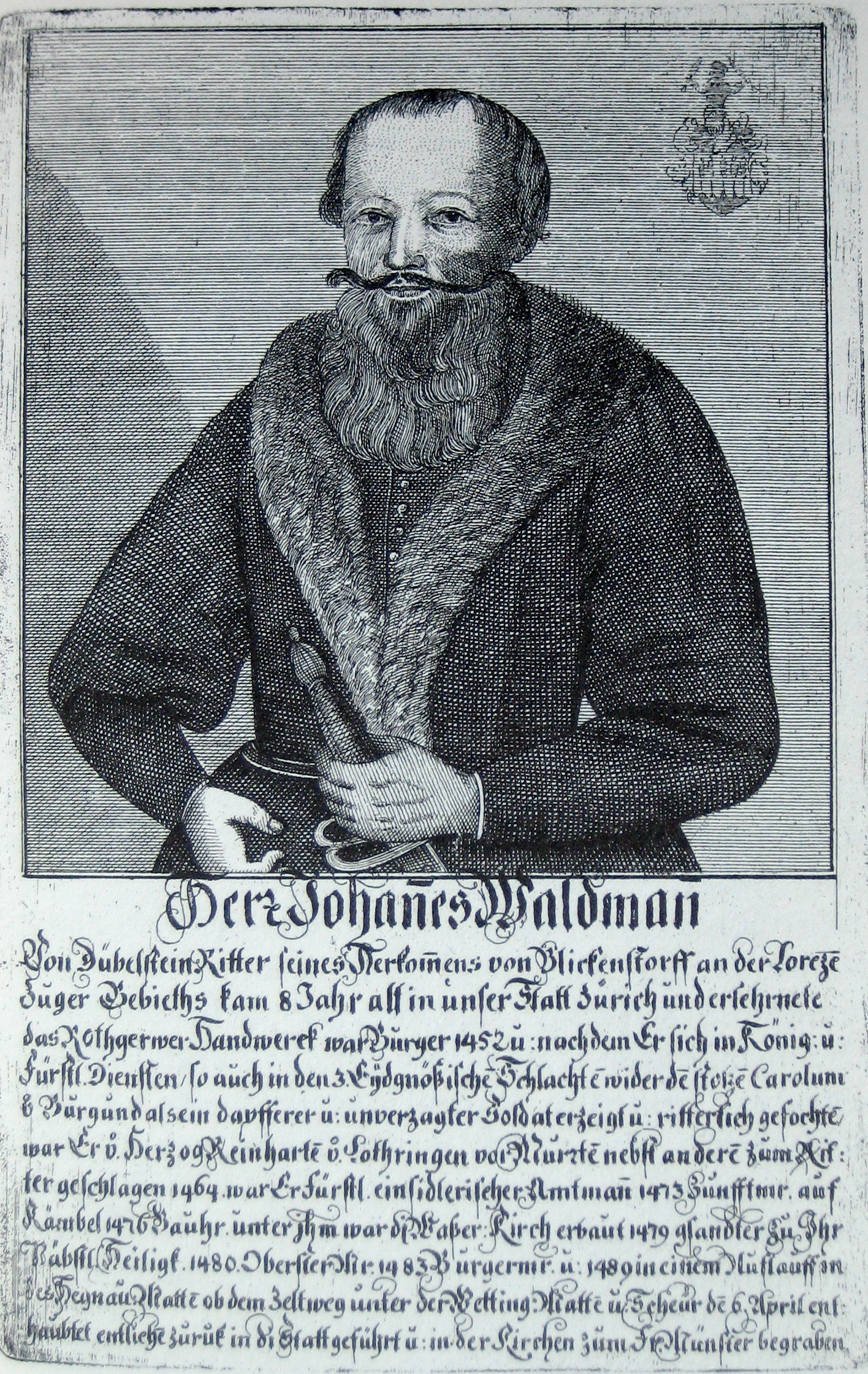 Portrait Bürgermeister Hans Waldmann, gegen Ende des 17. Jhd.